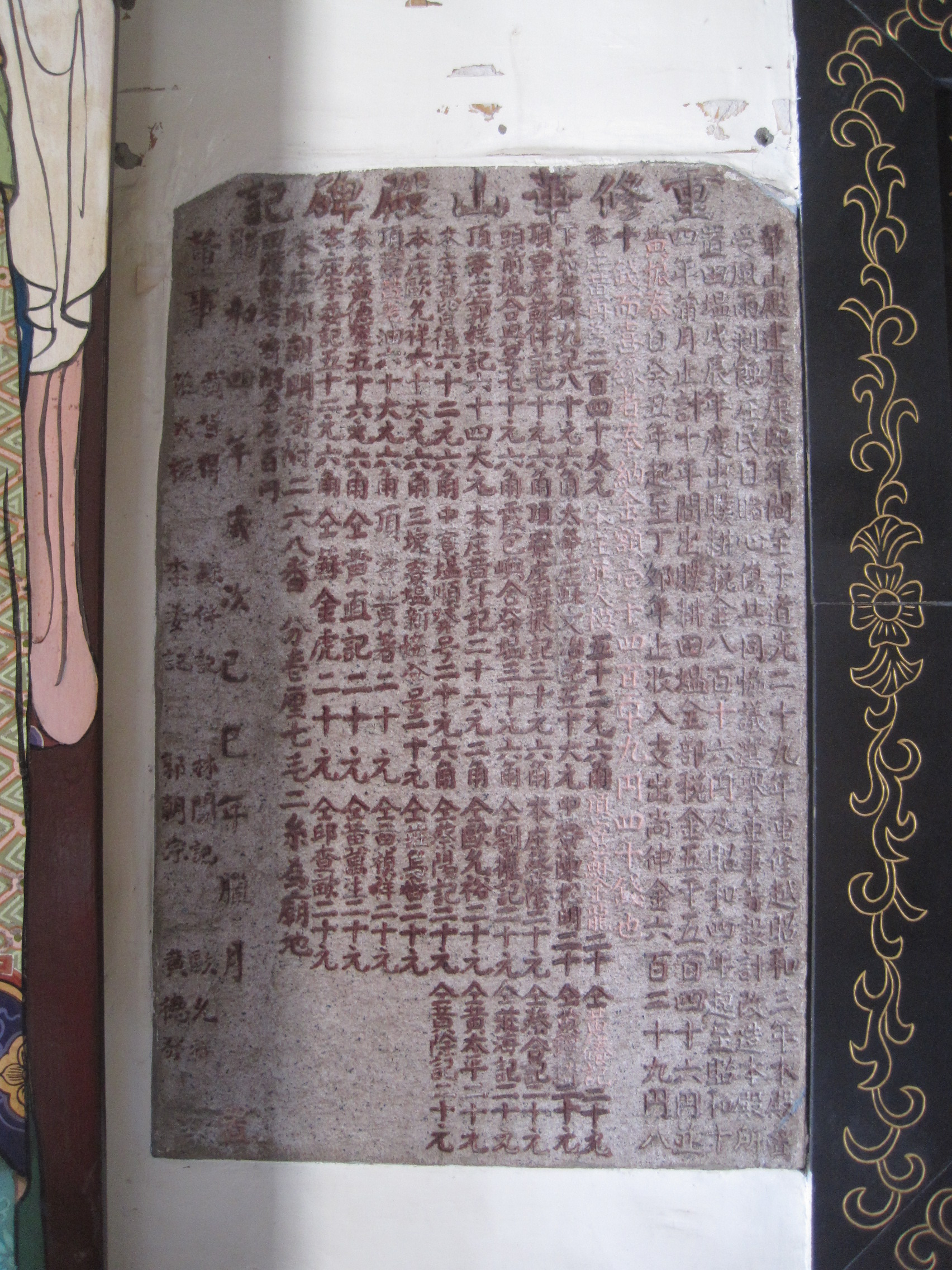 重修竹滬華山殿碑記（1929），位於竹滬華山殿